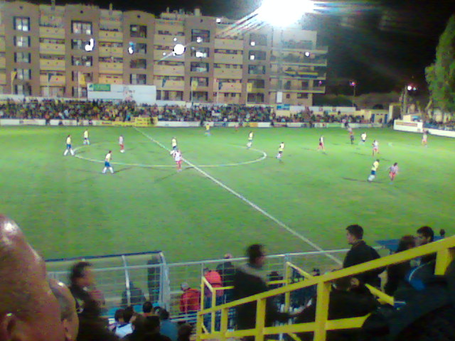 Partido de la Copa del Rey, en el estadio Los Arcos, Orihuela - Atlético de Madrid.